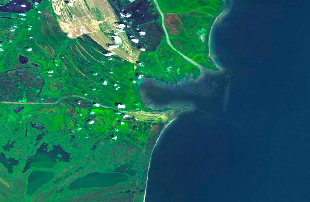 Sulina vazuta din spatiu